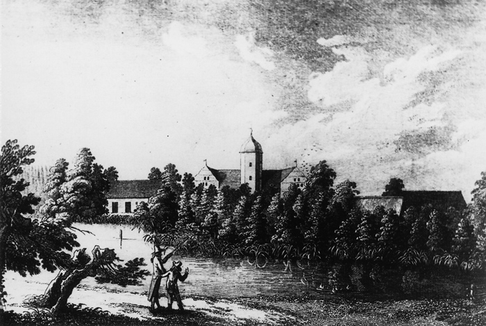 Wasserschloss Quilow Stich 1792